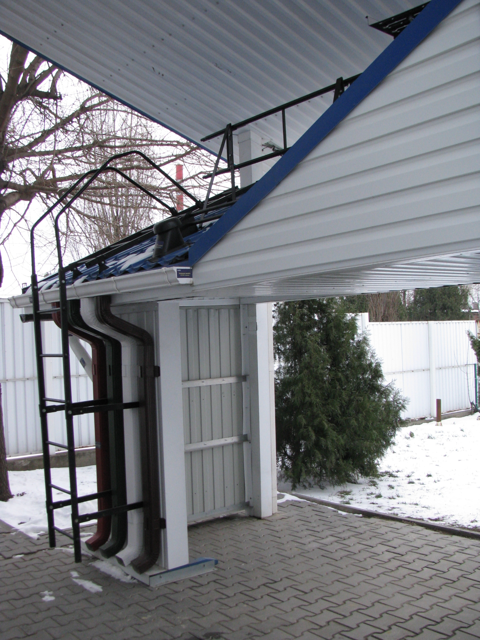 Пример облицовки фасадов стальным сайдингом